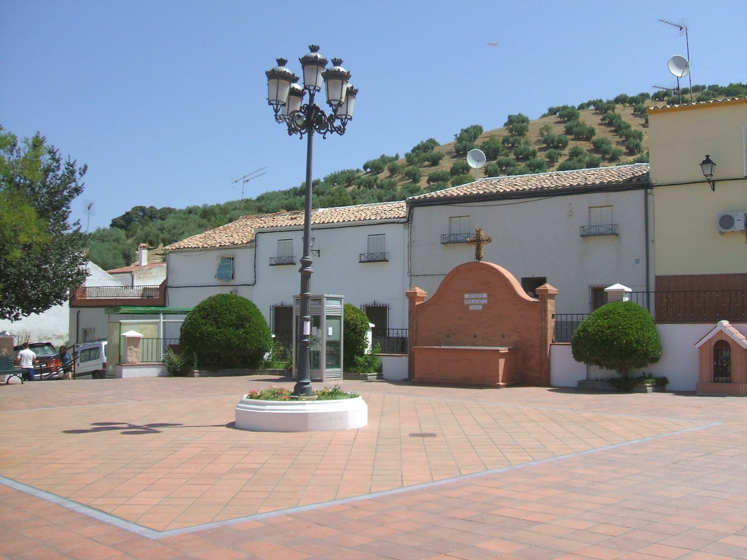 DETALLE DE LA FUENTE